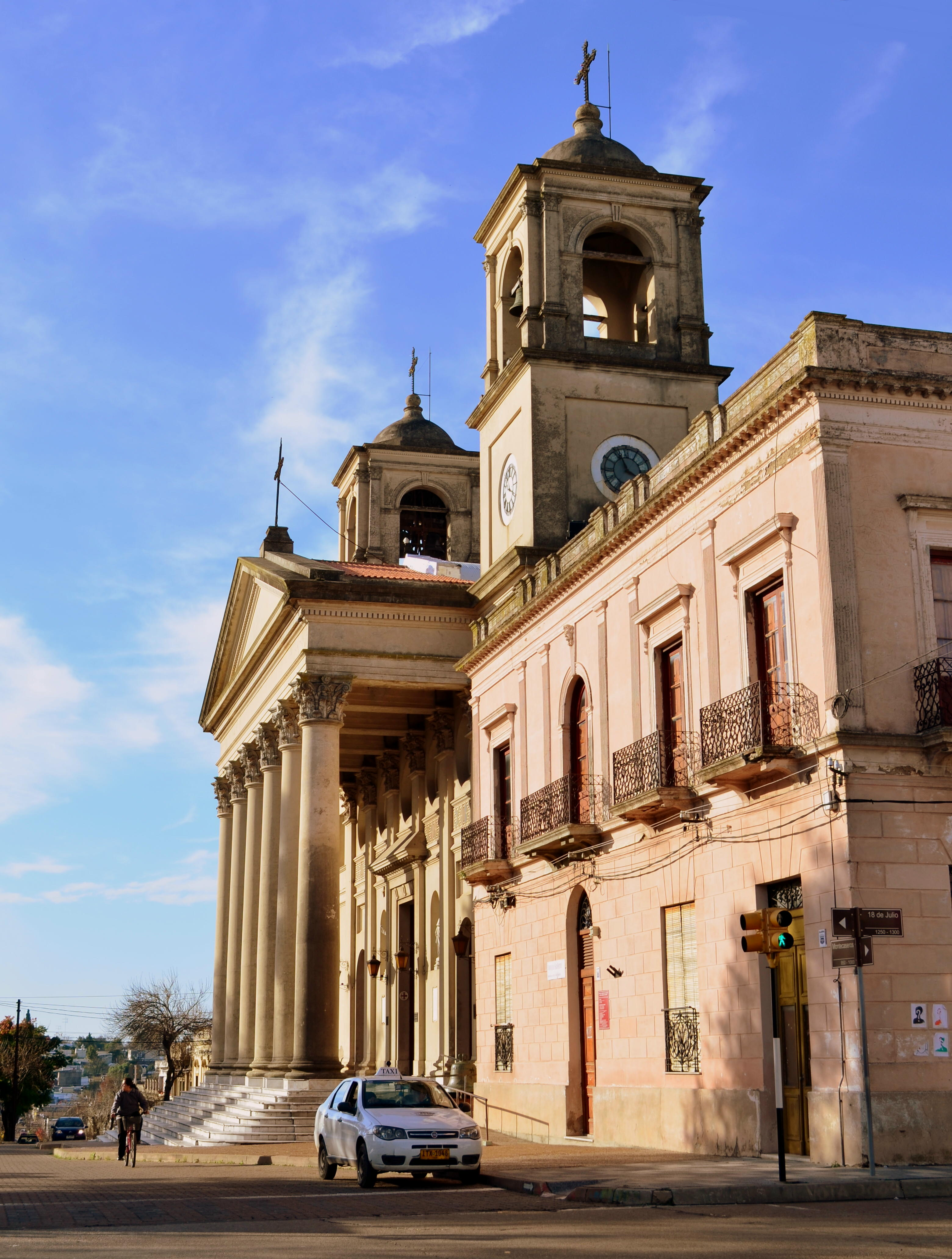 Basílica de Nuestra Señora y San Benito de Palermo con su equipamiento.. Ubicada en el departamento de Paysandú